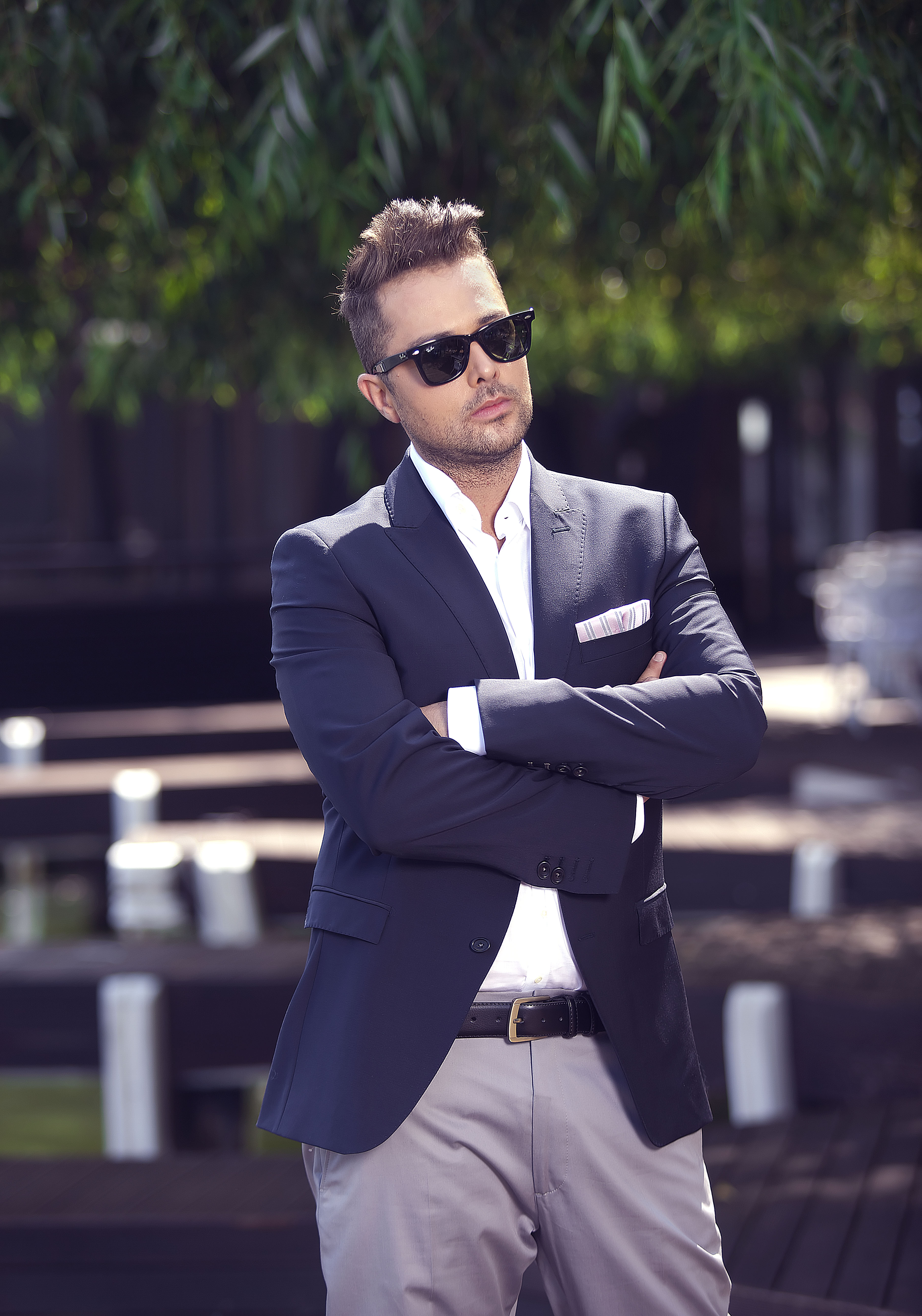 Sedinta foto "La Vita e Bella"